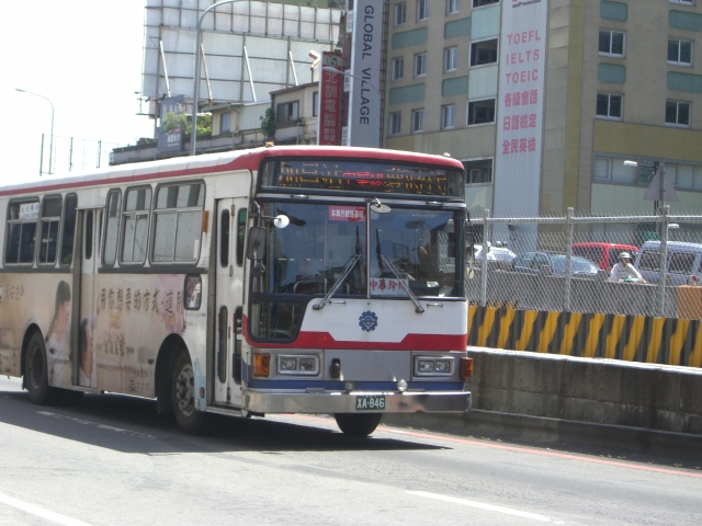 高雄市公共汽車管理處大客車XA-846行駛中華幹線，經過中博高架橋旁。